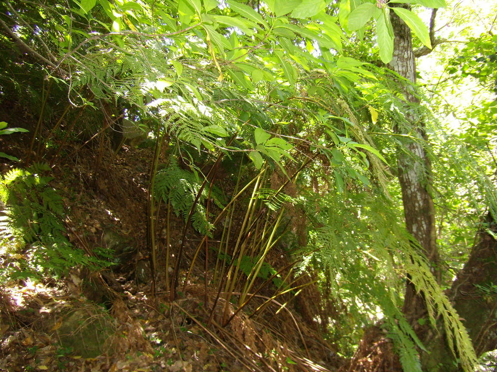 089. Río de la Miel - Helecho de colchonero (Culcita macrocarpa)